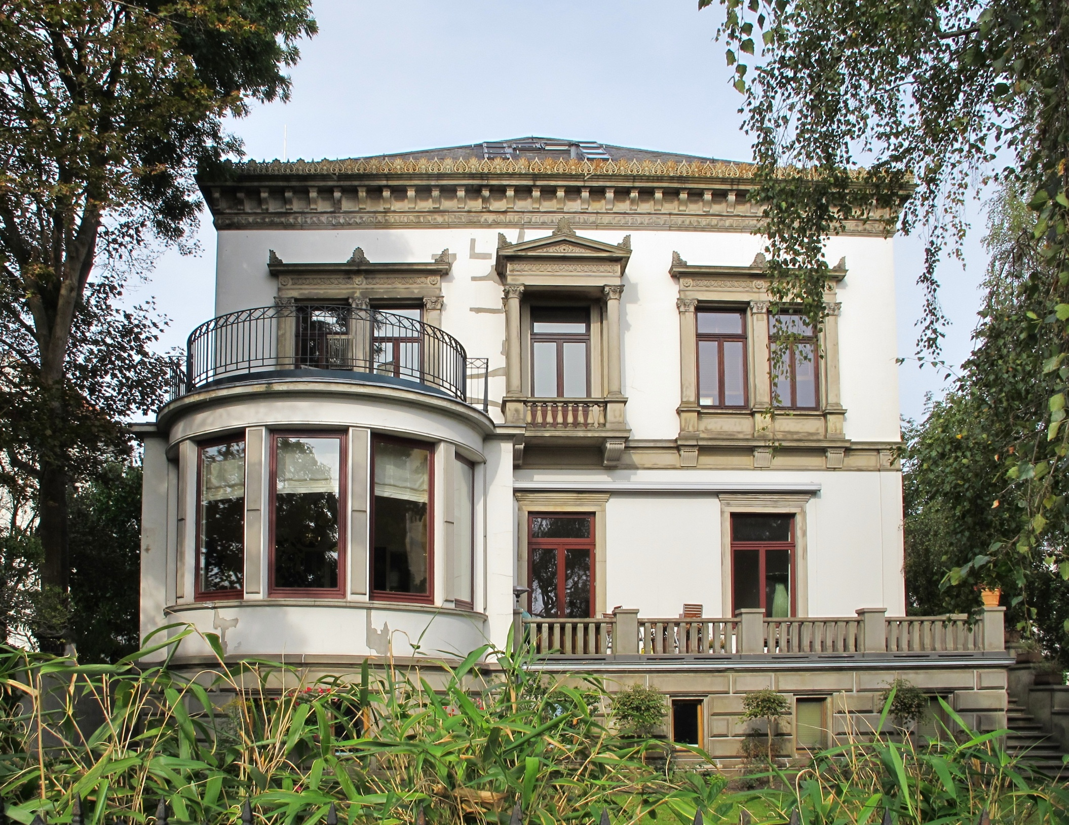 Villa Büsing in Bremen, Mozartstraße 15Das abgebildete Objekt ist ein geschütztes Kulturdenkmal in der Freien Hansestadt Bremen, mit der Nr. 0932 beim Landesamt für Denkmalpflege registriert.